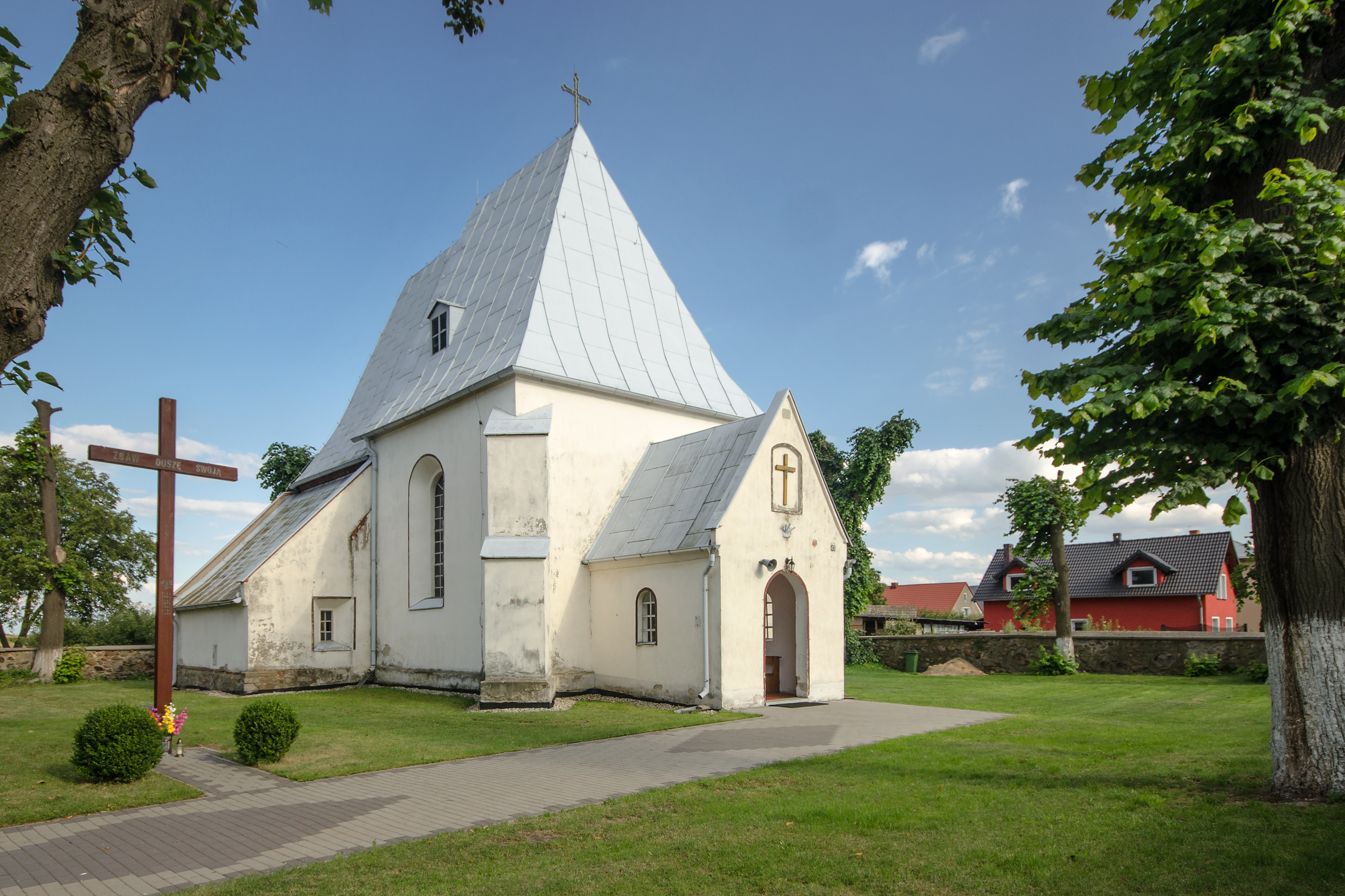 Kościół św. Piotra i Pawła w Bierzowie